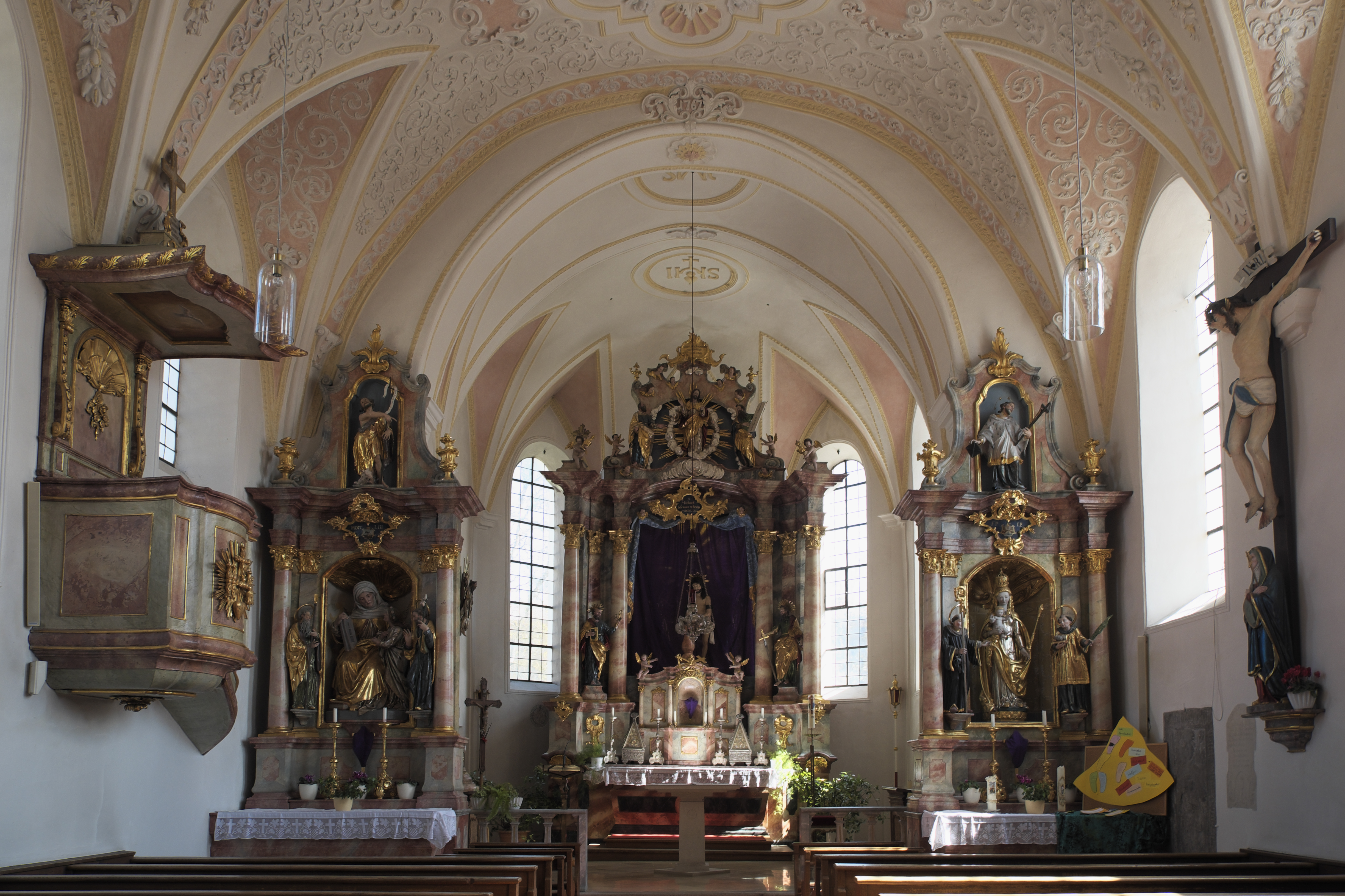 Katholische Pfarrkirche St. Michael in Etting (Polling) im Landkreis Weilheim-Schongau (Bayern/Deutschland), Innenraum